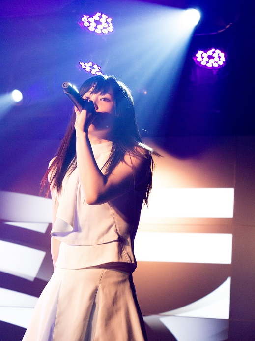 ミライスカート 相谷麗菜